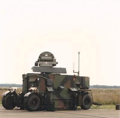 HSA KL/MSS-6720 Flycatcher vuurleidingsradar ten behoeve van de luchtverdediging, in gebruik bij de Koninklijke Luchtmacht en de Koninklijke Landmacht, gefotografeerd op een luchtmachtbasis. Bij de Koninklijke Landmacht werd de Flycatcher gebruikt bij 105 Luchtdoelartilleriebatterij. Deze batterij werd op 1 januari 2004 opgeheven. Foto gemaakt in 1991.